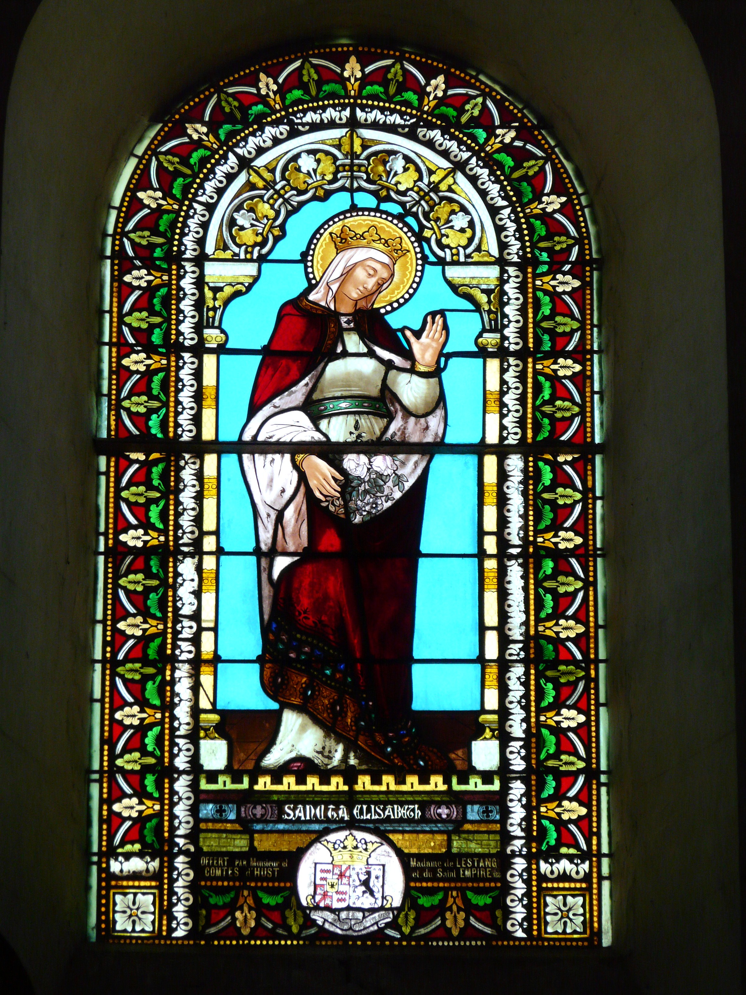 Vitrail de l'église Saint-Saturnin représentant sainte Élisabeth, Quinsac, Dordogne, France